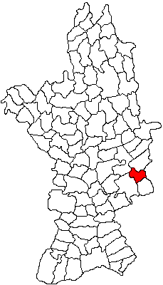 Categorie:Hărţi ale judeţului Olt